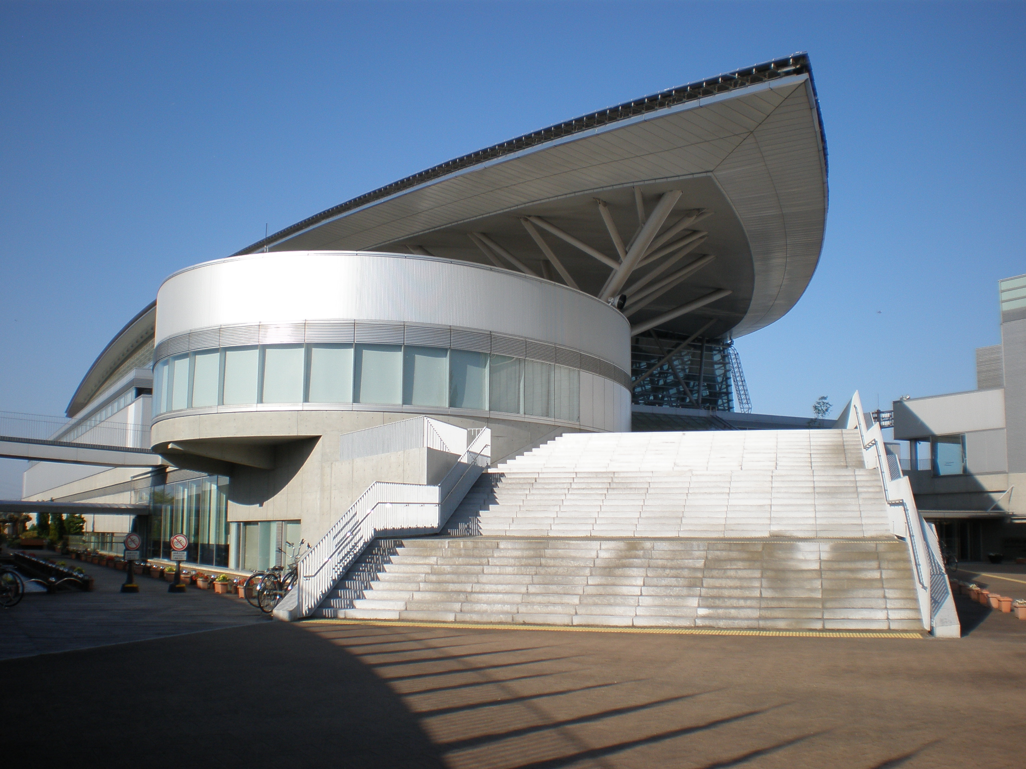 愛知県小牧市の小牧市スポーツ公園にあるパークアリーナ小牧